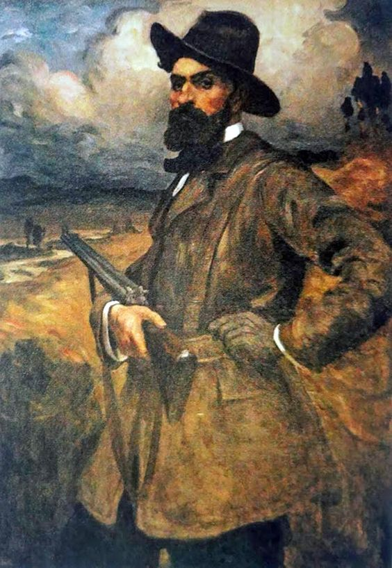 Autoportrait - (œuvre aussi dénommée "Le chasseur"), 1913 (HST 128 x 88). Mairie de Saujon